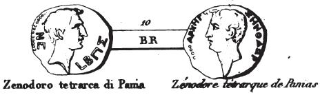 incisione da moneta antica